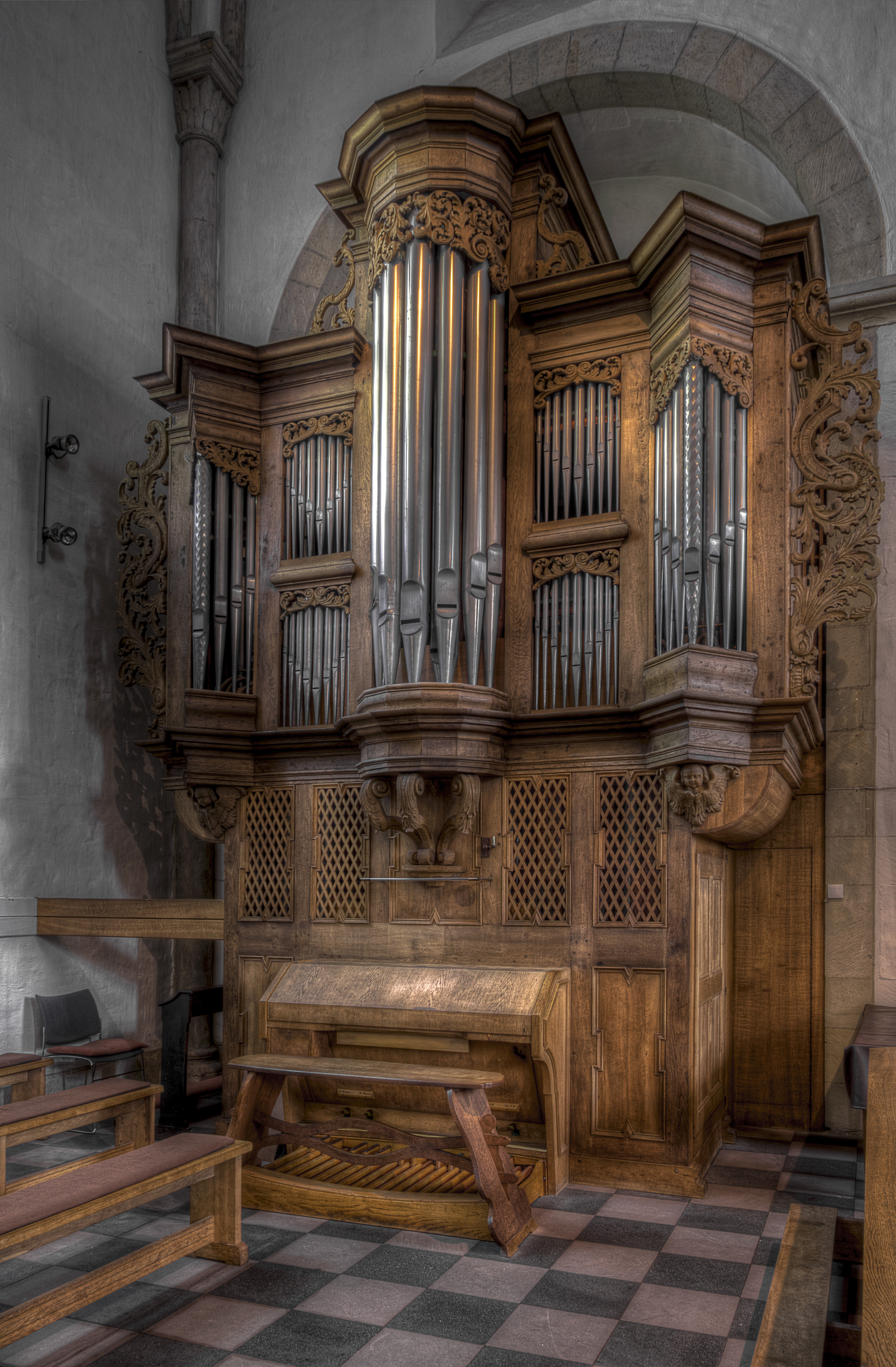 St. Ludgerus - Die Orgel.jpg